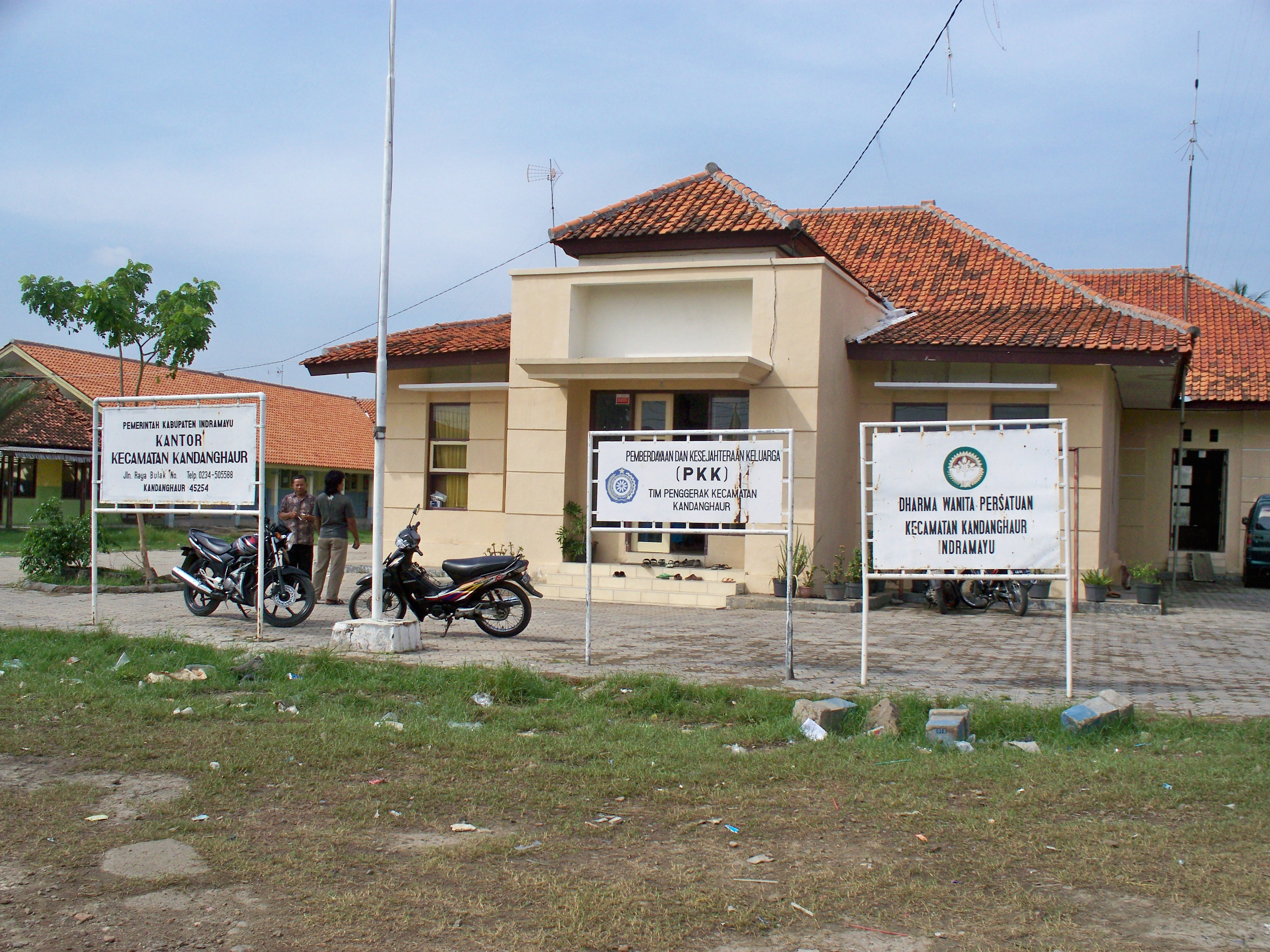 Kantor Camat Kandanghaur